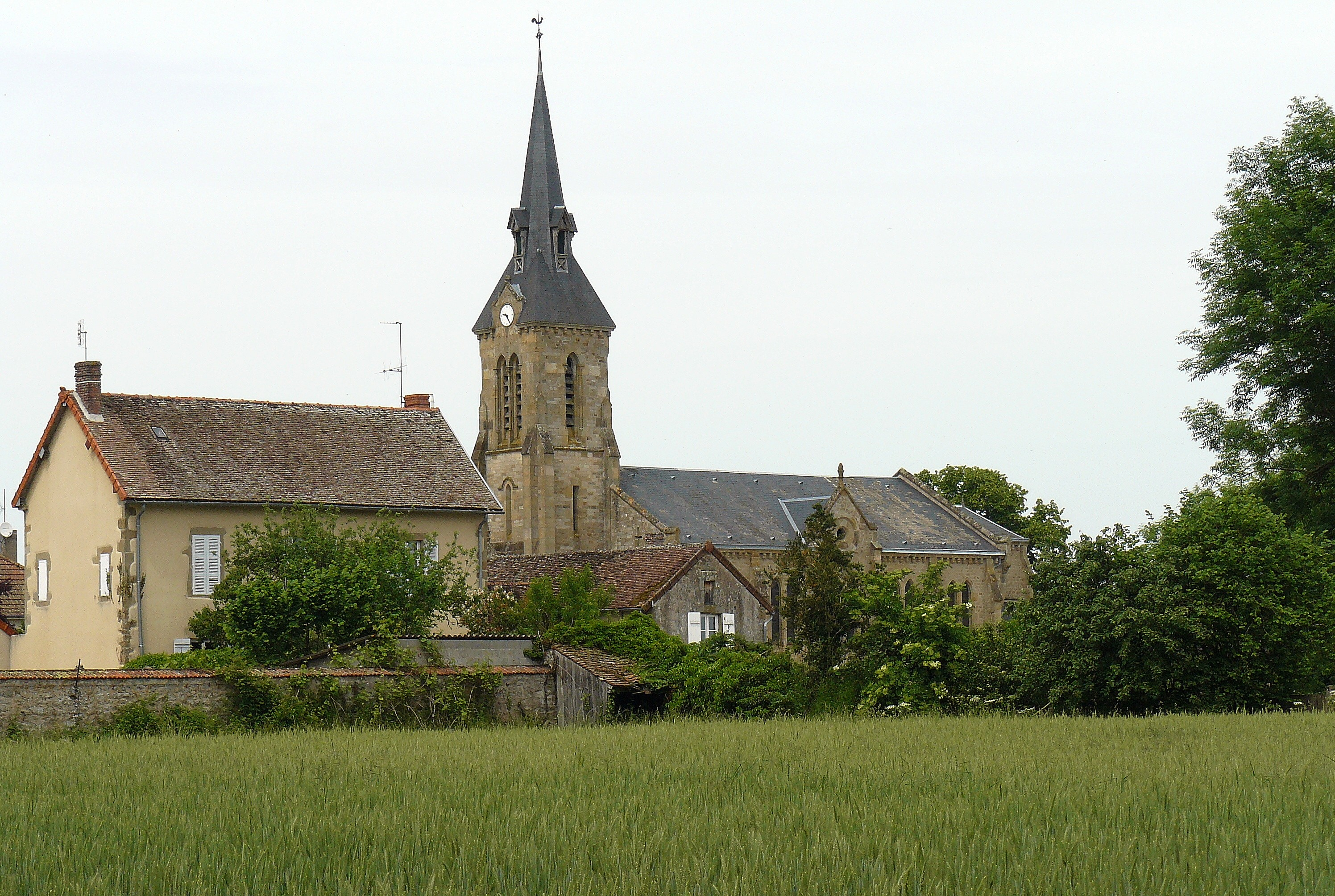 Tavernay (Saône-et-Loire, France)